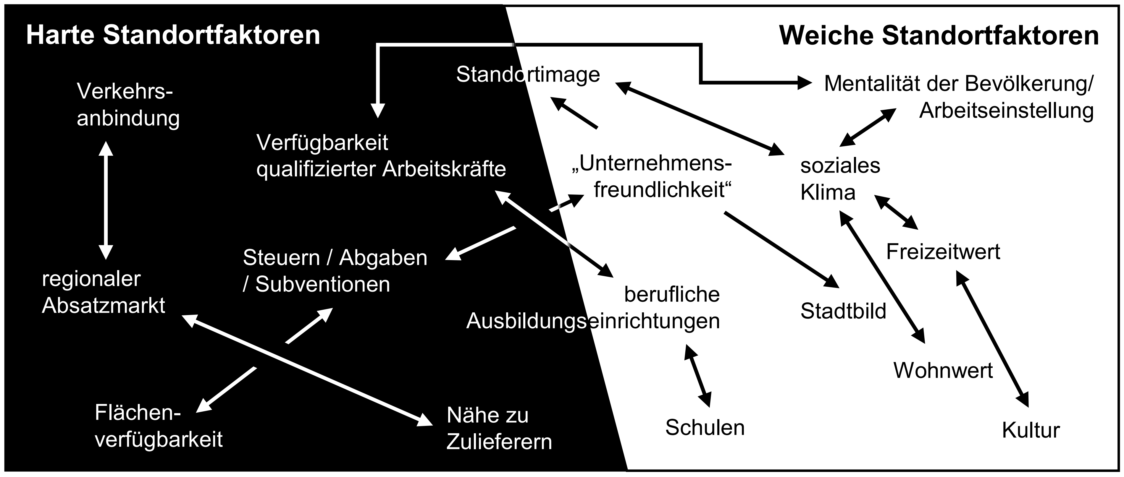 Exemplarische Darstellung harter und weicher Standortfaktoren, Grundlage: Korby, Wilfried; Kreus, Arno; Ruhren, Norbert von der (Hrsg.) (2014): Fundamente. Geographie Oberstufe: Stuttgart u.a.: Klett, S. 192.